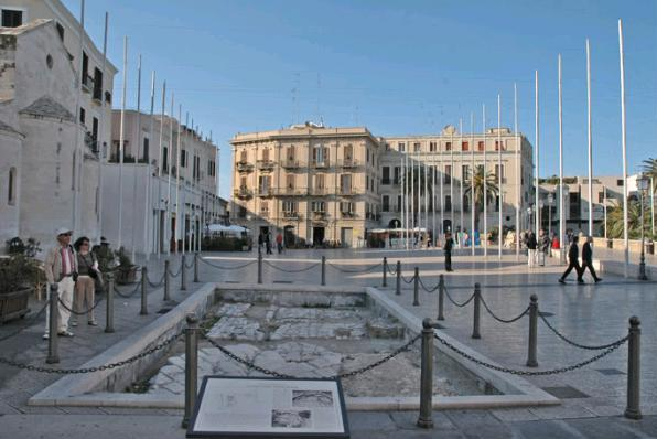 Piazza del Ferrarese presso il borgo antico di Bari. Licensing Immagine tratta dal sito Bari.live. Autorizzazione all'uso concessa, previa citazione della fonte. OTRS #2007062110004343.